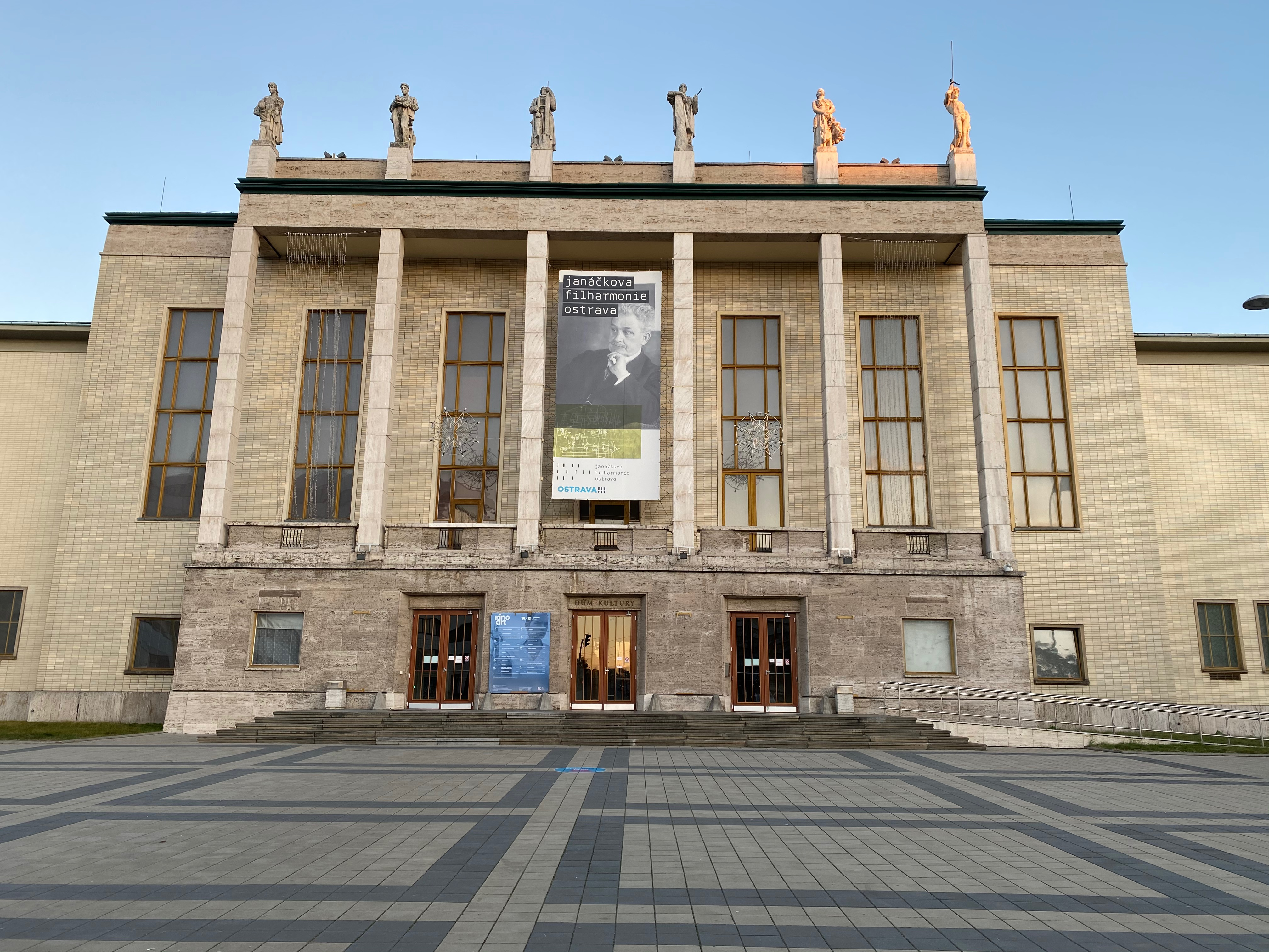 Orquestra Filharmònica Janáček